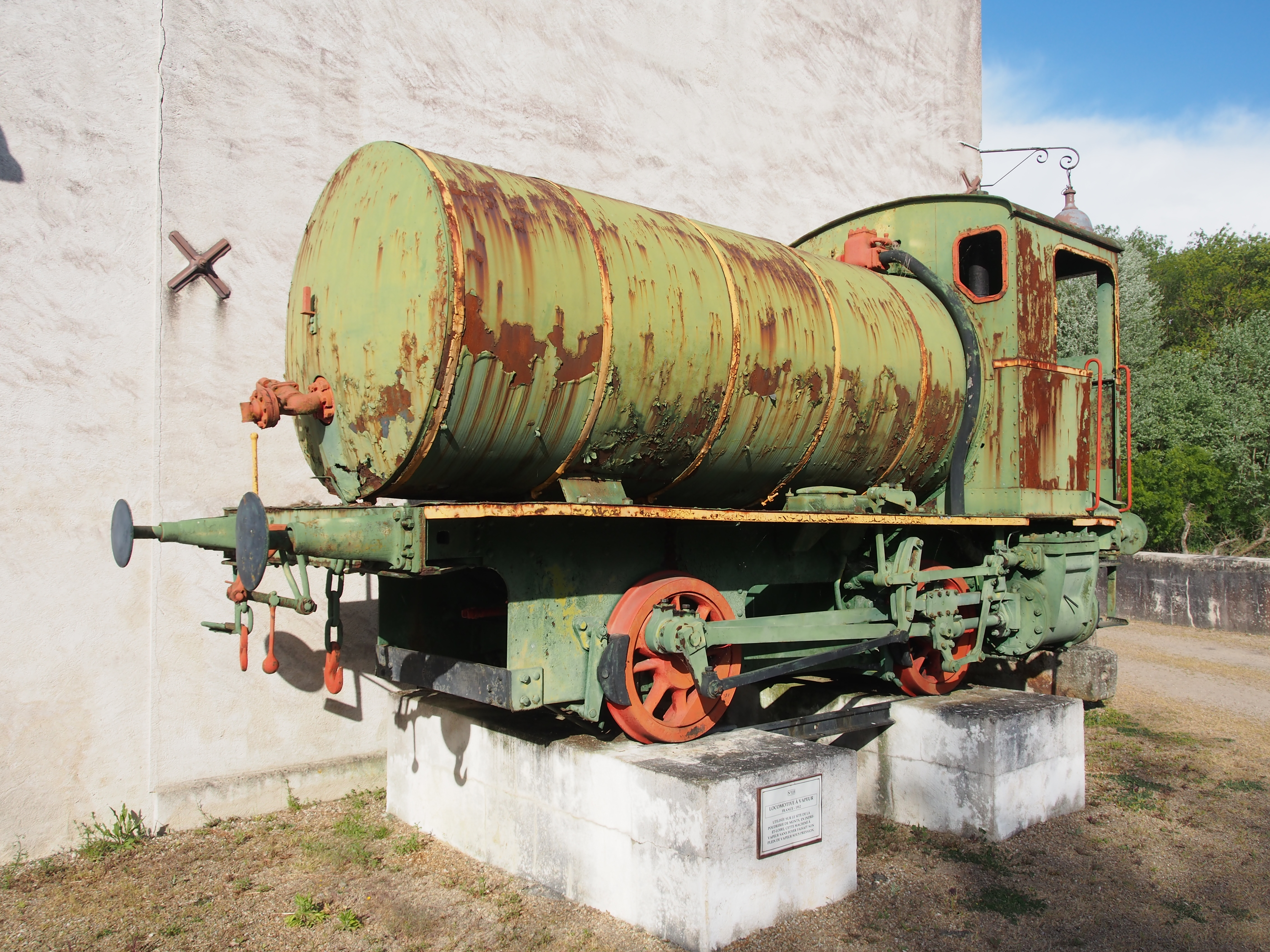 Photographed at Musée Maurice Dufresne, Azay-le-Rideau, France.